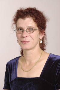 Dorothée Menzner, Abgeordnete im Bundestag, Fraktion DIE LINKE